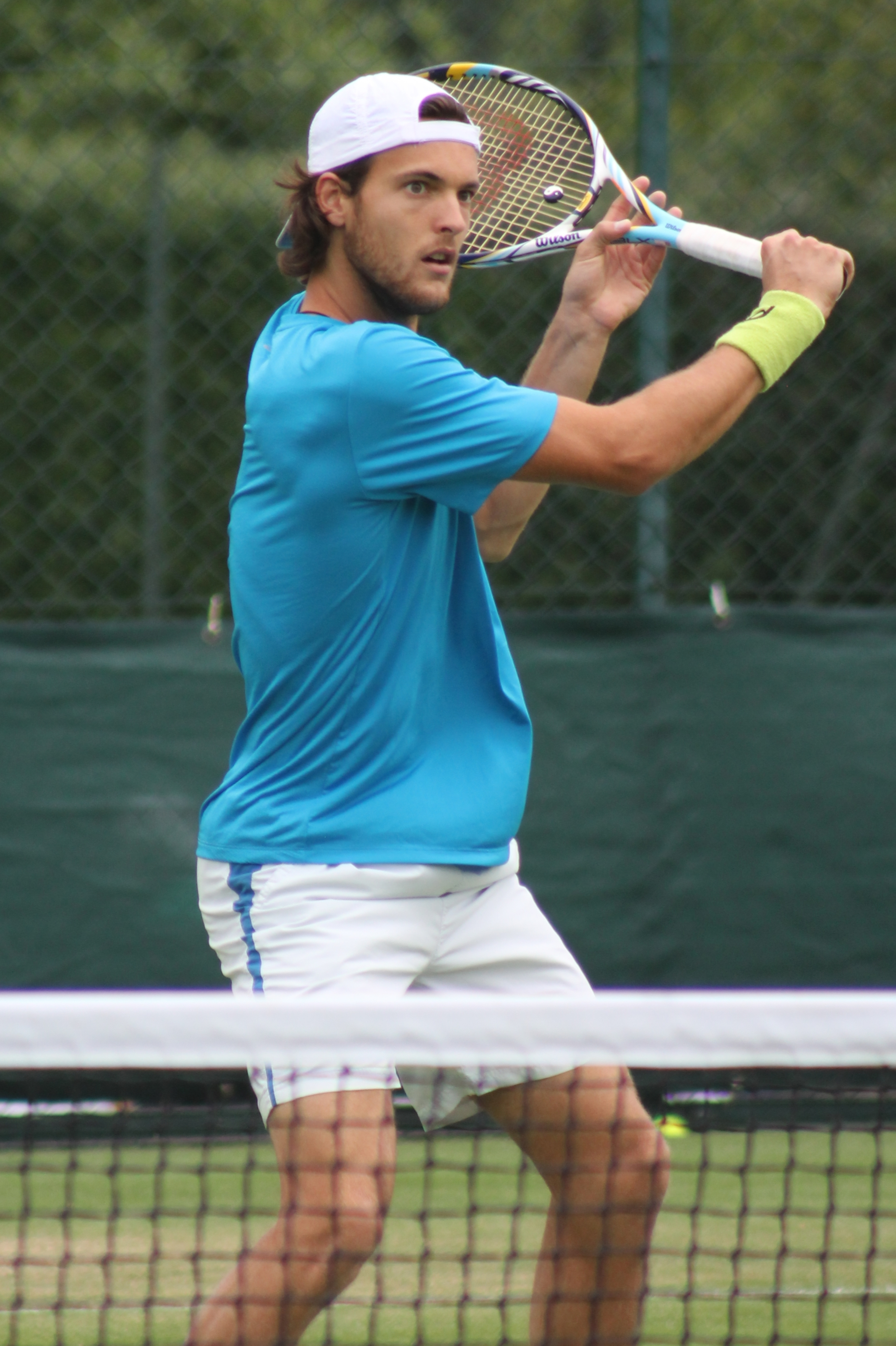 Sousa WM13-004